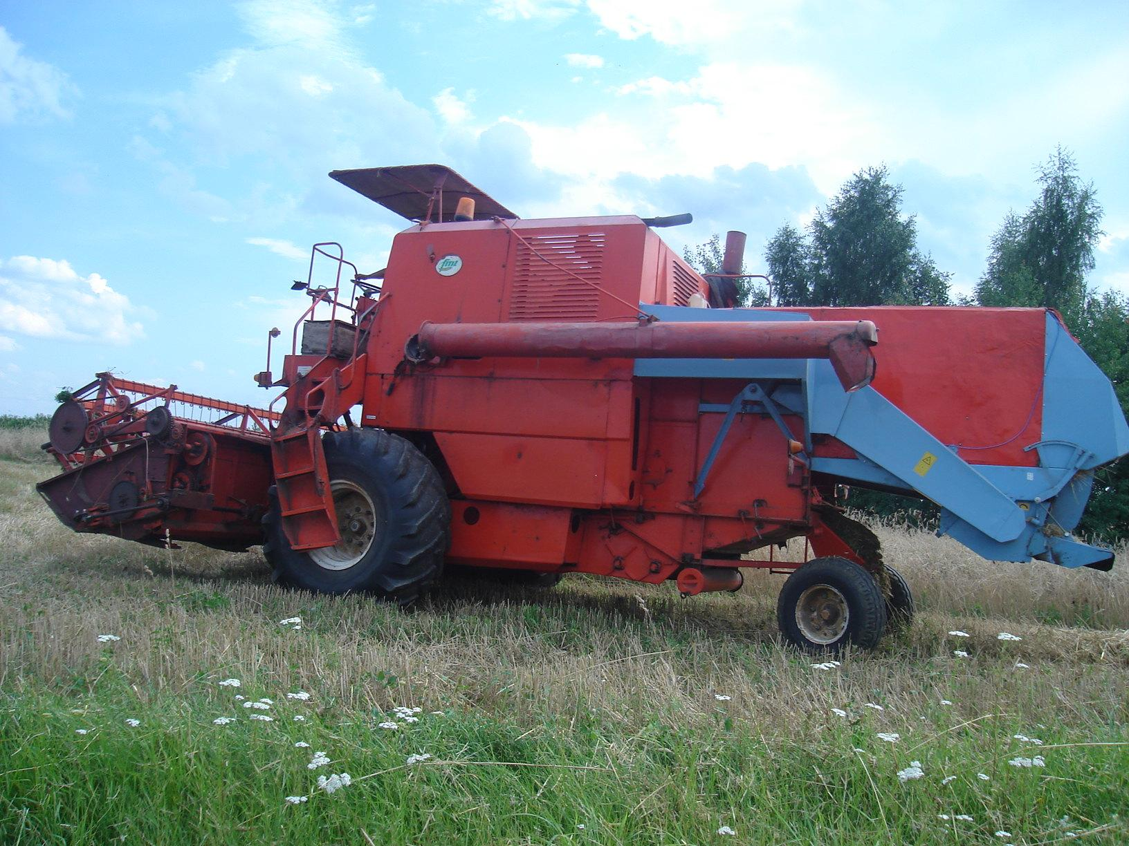 Bizon ZO56 z 1987 roku